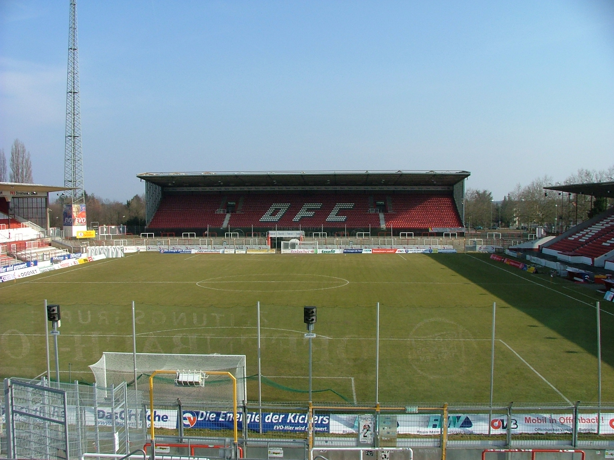 Stadion am Bieberer Berg, Offenbach am Main, Germany